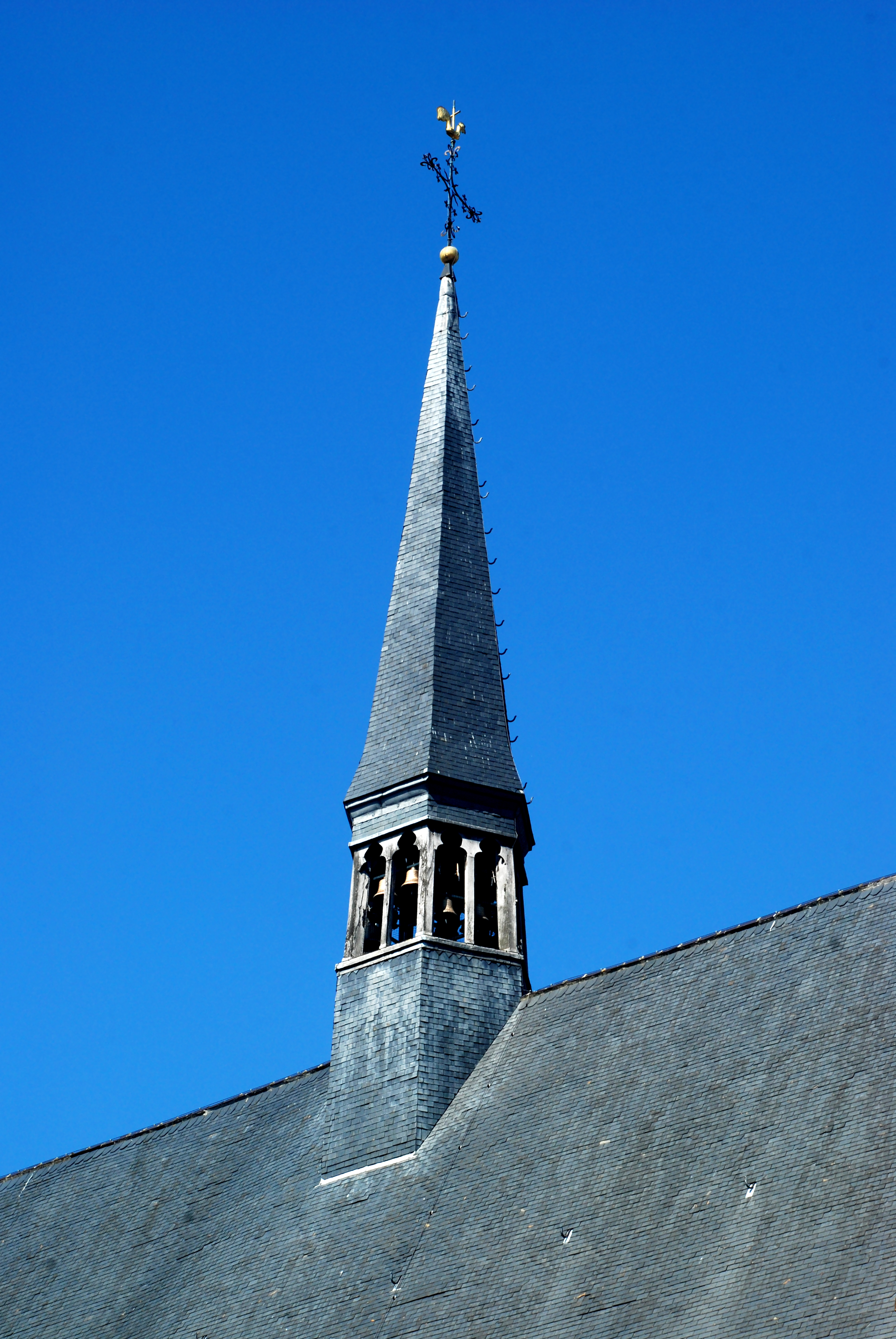 Belgique - Louvain - Église Saint-Jean-Baptiste-du-Béguinage - clocher